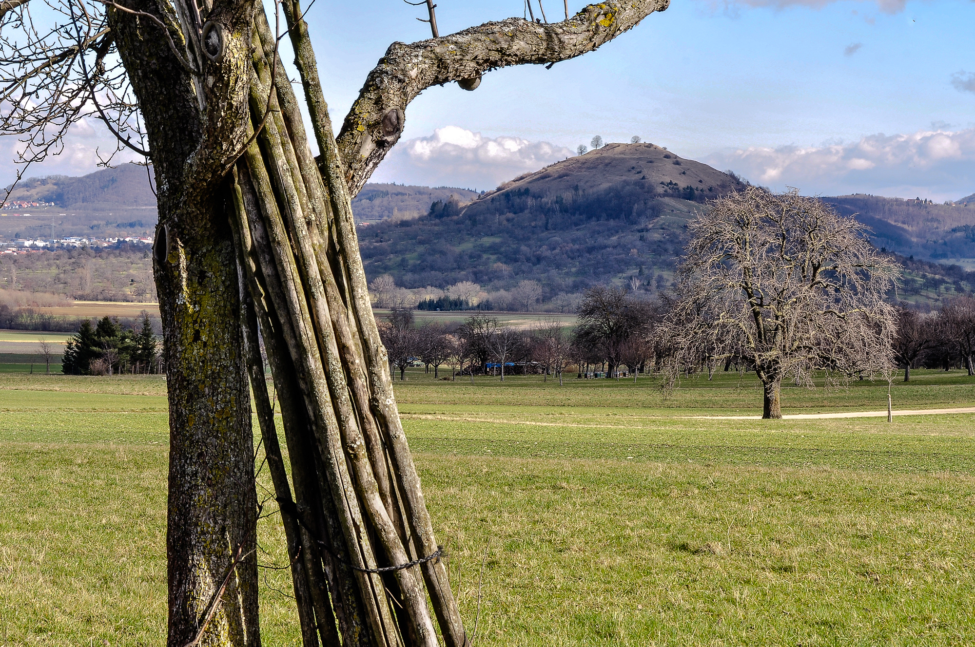 Naturschutzgebiet 1.177 „Limburg“, Landkreis Esslingen, Baden-Württemberg; die Limburg von Westen über die Streuobstwiesen bei Bissingen an der Teck gesehen